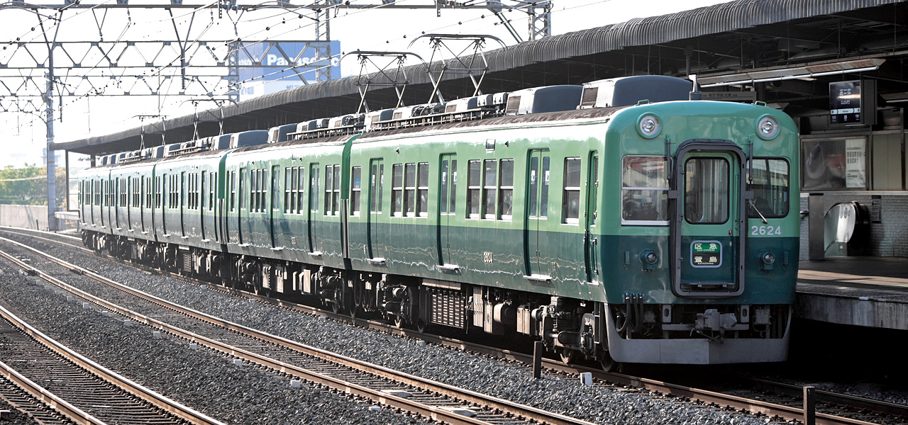 Keihan 2600 Series EMU.